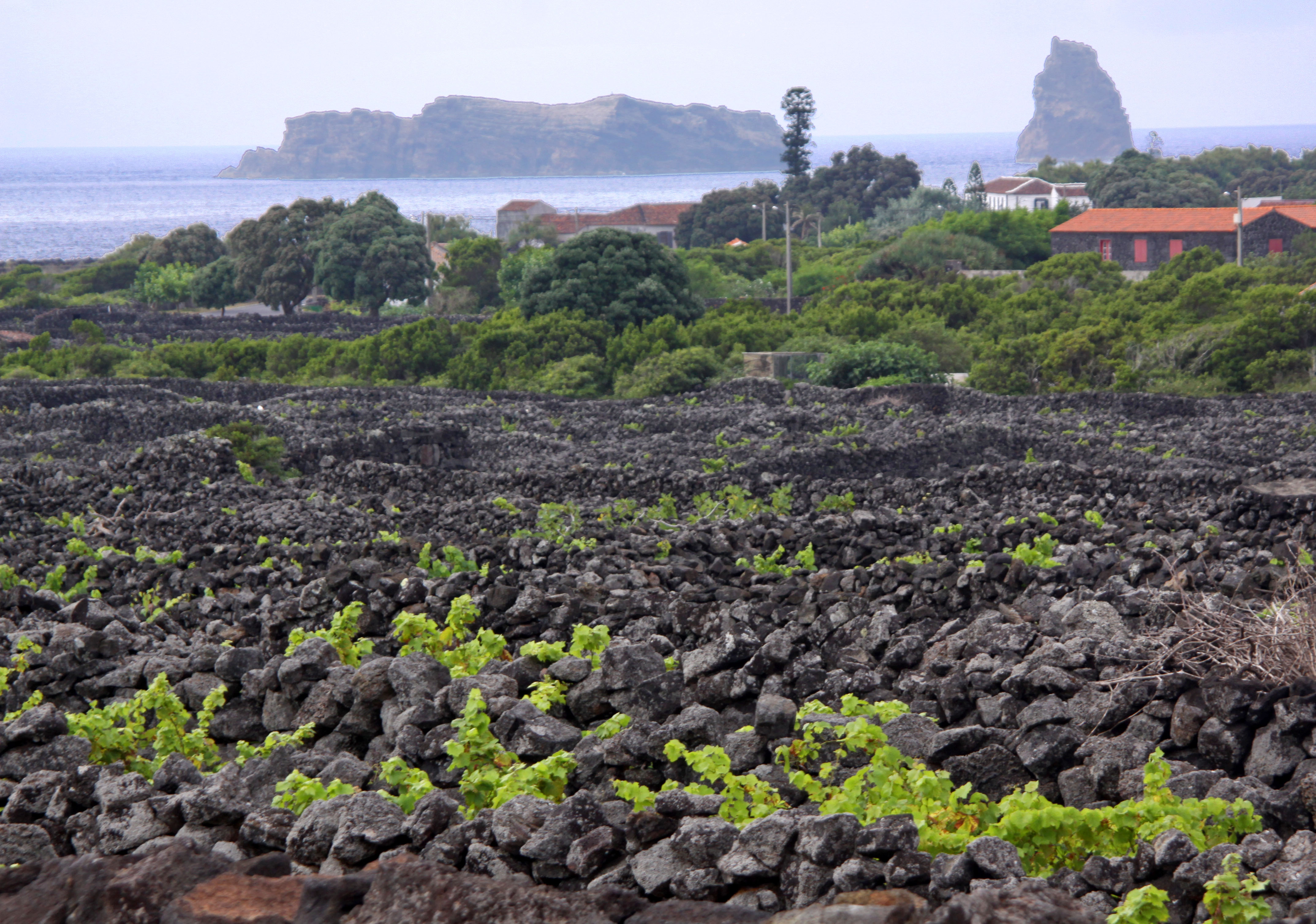 Ilha do Pico, Açores. Dans les vignes près de Madalena.